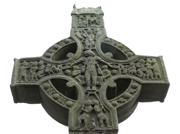 Monasterboice, West Cross, head, west side